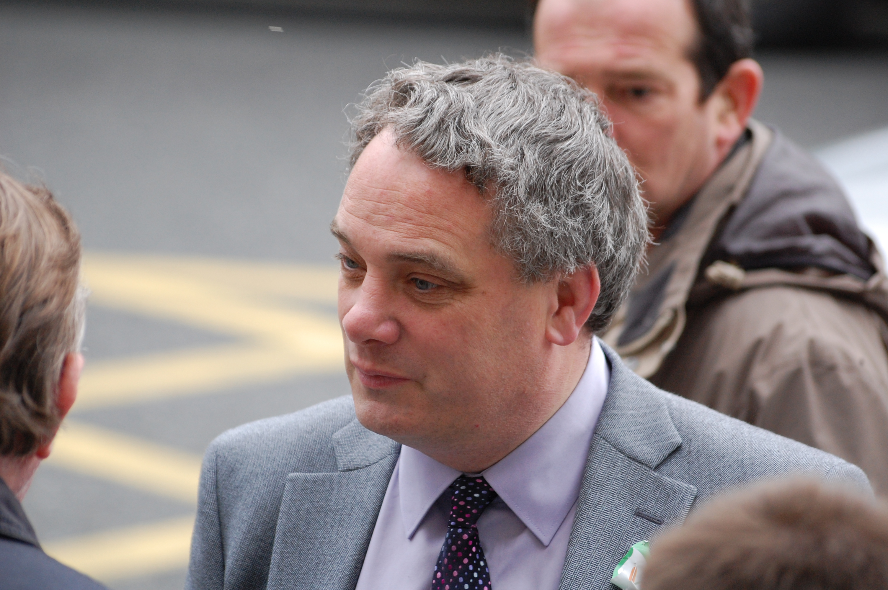 Aengus O Snodaigh TD